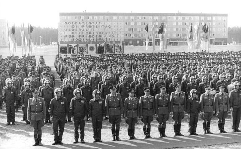 DDR, NVA-Truppenbesuch, Appell ADN-ZB Mittelstädt 29.8.85 DDR: Truppenbesuch- Den Abschluß des Truppenbesuchs des Generalsekretärs des ZK der SED und Vorsitzenden des Staatsrates der DDR, Erich Honecker, Vorsitzender des Nationalen Verteidigungsrates der DDR, bildete ein Meeting im Jagdfliegergeschwader "Fritz Schmenkel" mit mehr als 2000 Angehörigen aller Waffengattungen und Dienste der Luftstreitkräfte-Luftverteidigung sowie Zivilbeschäftigten und Familienangehörigen.